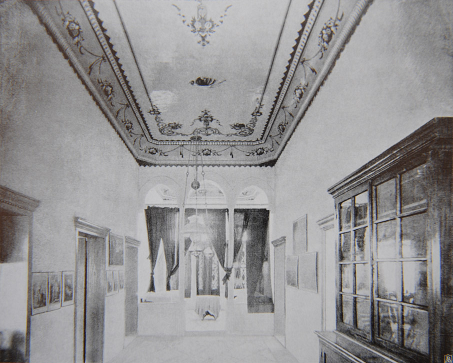 Приемная мужской учительской семинарии в Назарете. Фото 1907 г.